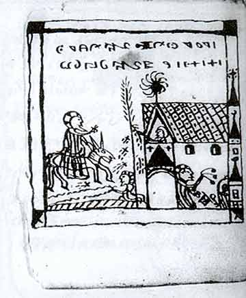 Una página del código Rohonc